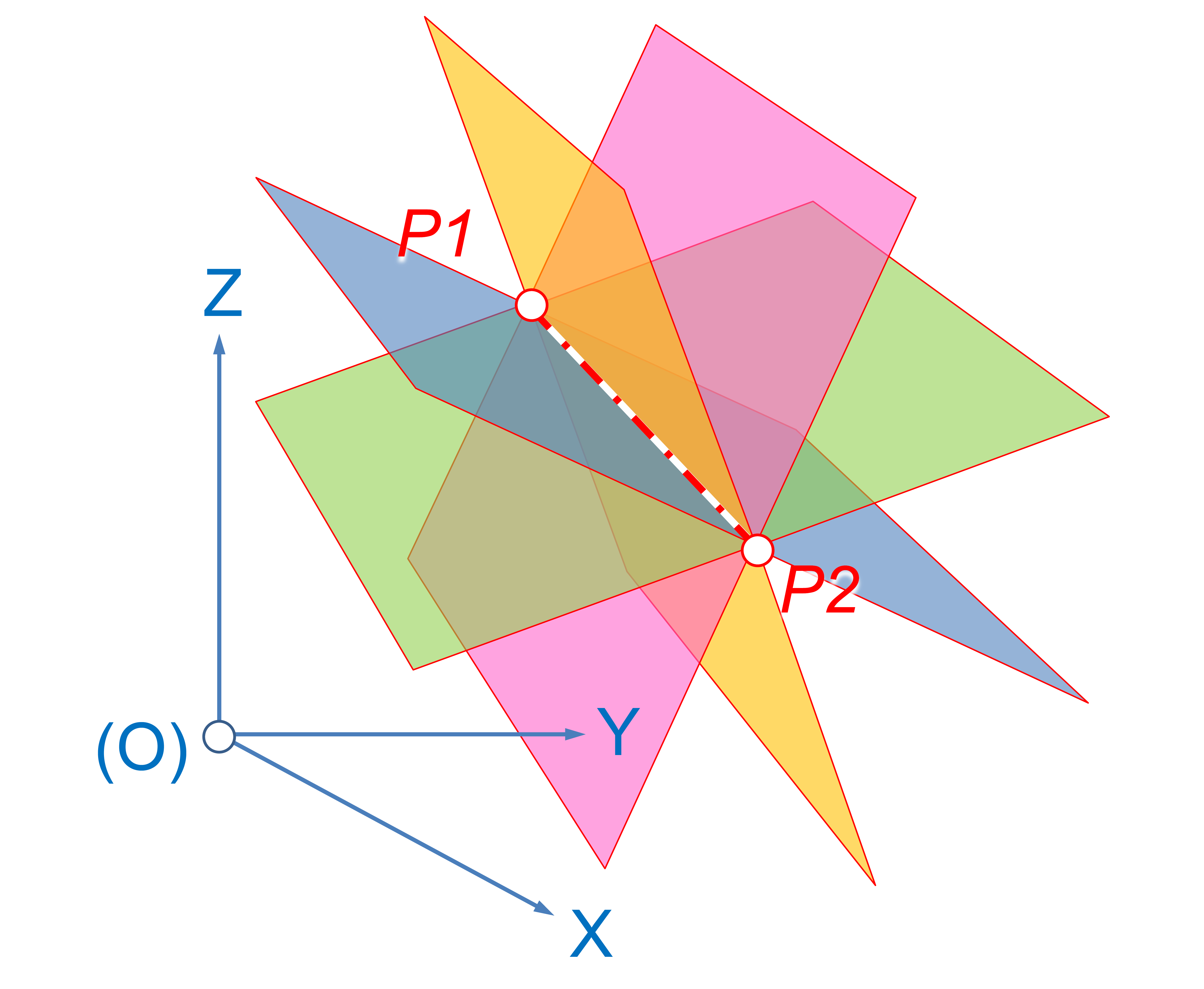 Haz de planos en el espacio euclídeo tridimensional que pasan por una recta, en este caso definida por los puntos P1 y P2